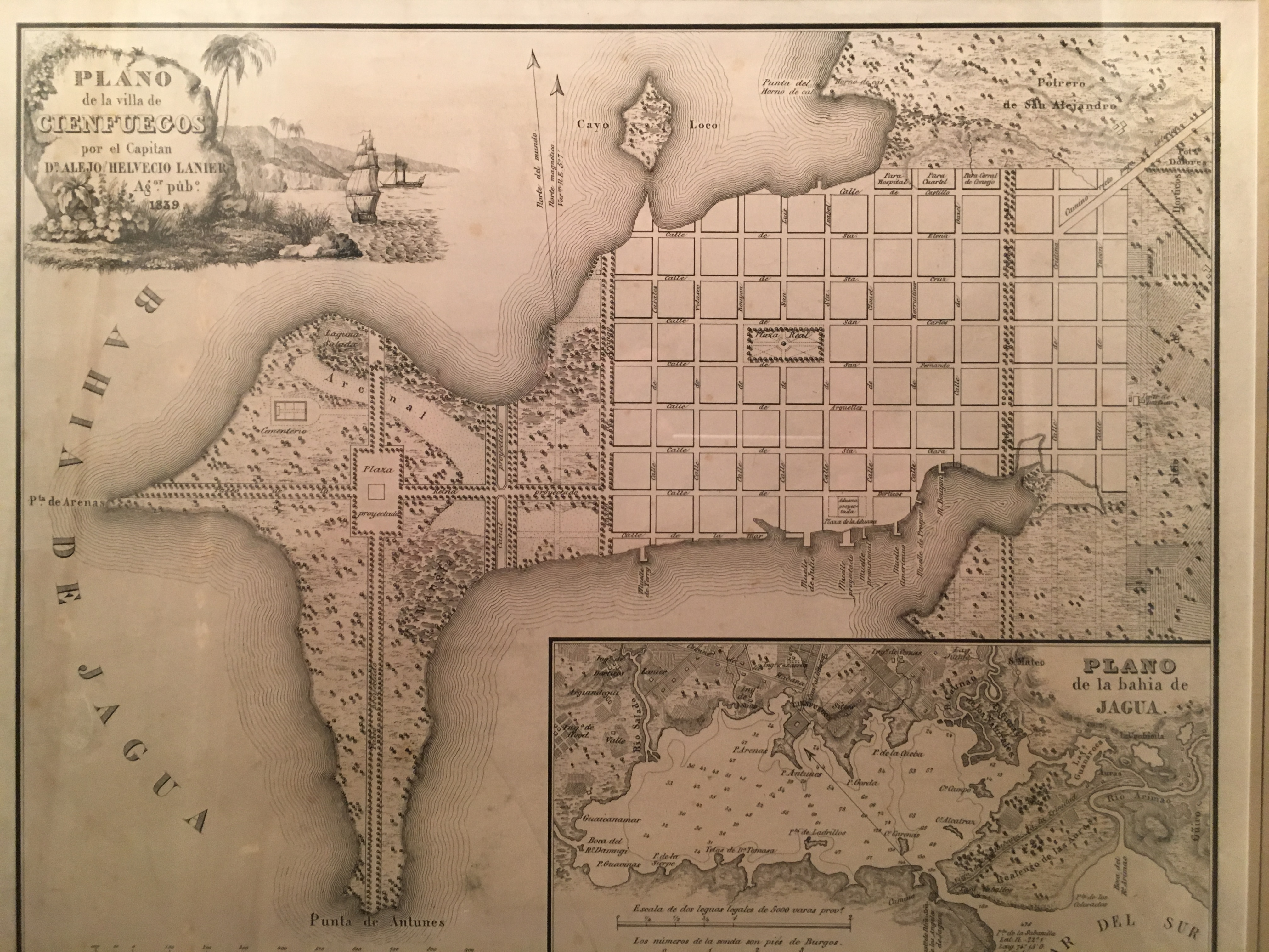 plan de Cienfuegos en 1839